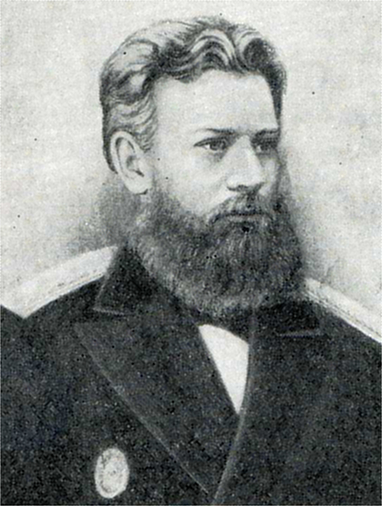 Домгер, Валериан Александрович